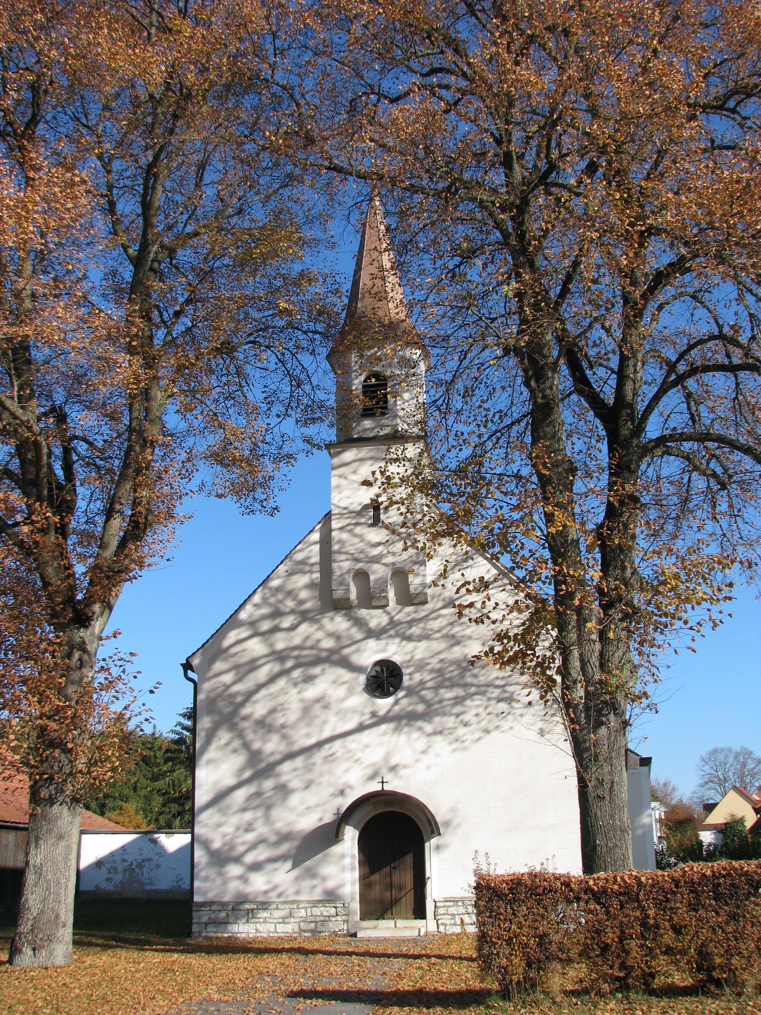 Schmellnricht, Ortsteil von Freystadt im Landkreis Neumarkt in der Oberpfalz, Bayern, Ortskapelle Mater dolorosa